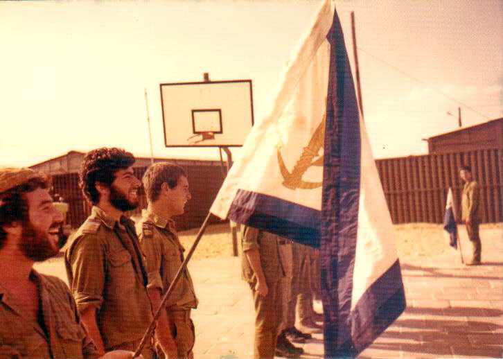 מסדר כבוד לאורחים בכירים